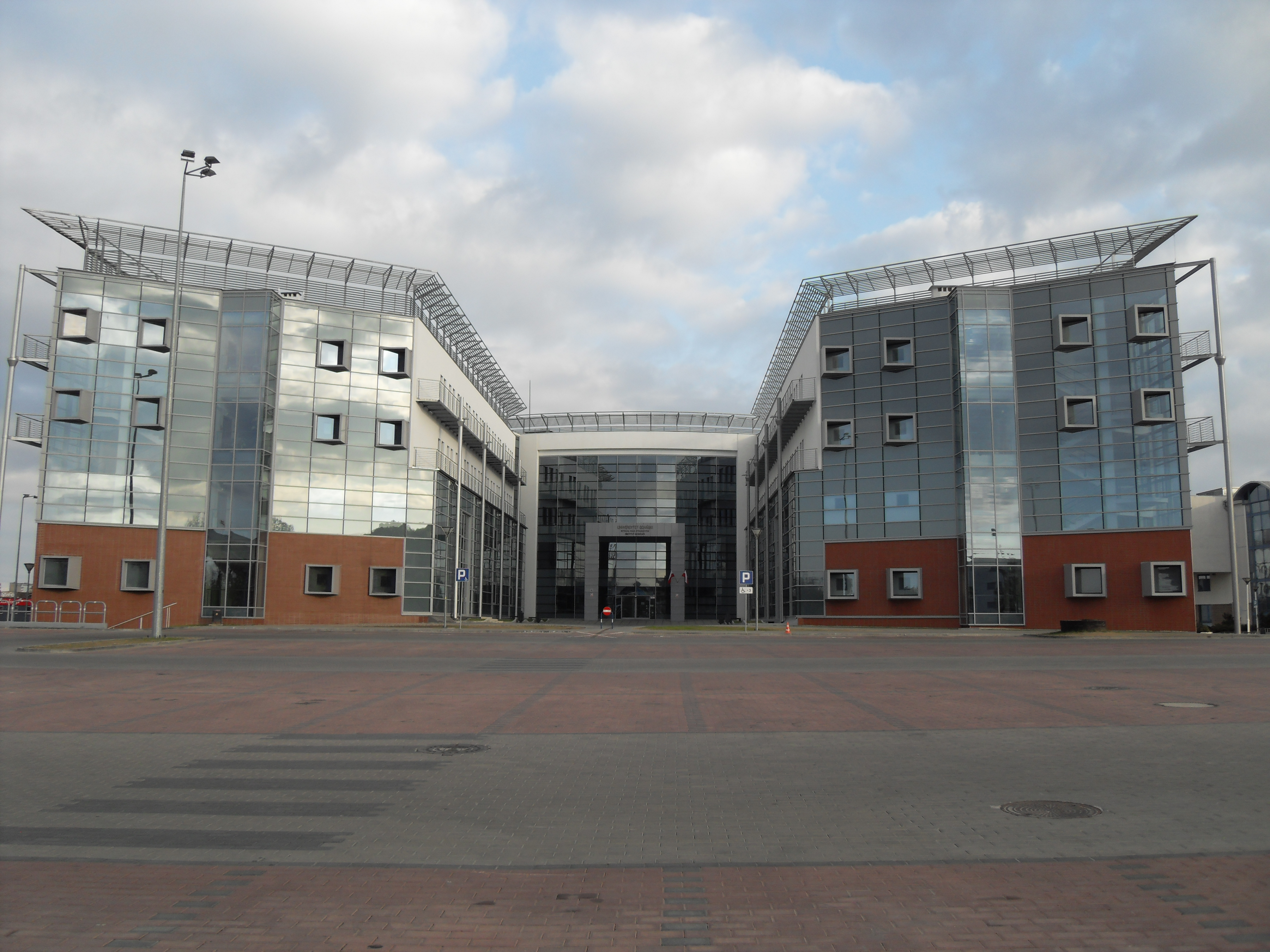 Gdańsk Oliwa. Uniwersytet Gdański, Wydział Nauk Społecznych.